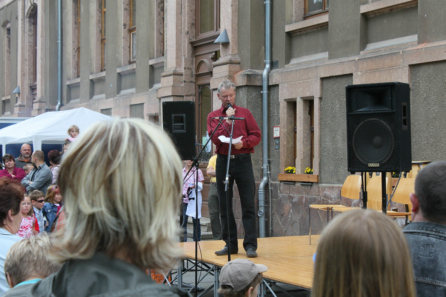 Bühne Schul- und Heimatfest Chemnitz-Harthau 2010